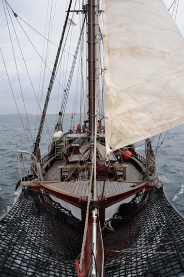 en el guardamancebos